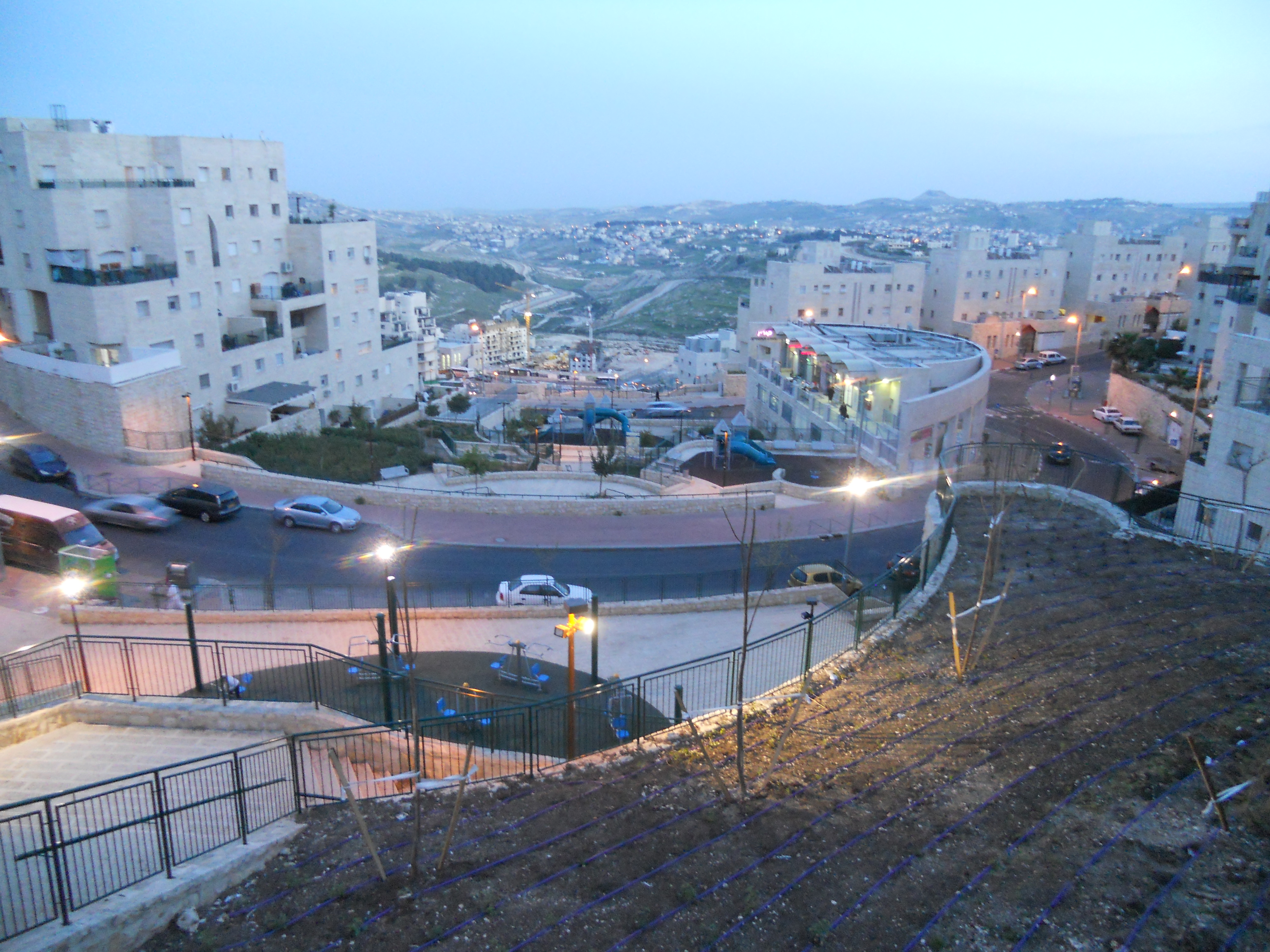 שכונת חומת שמואל הר חומה בדרום מזרח ירושלים